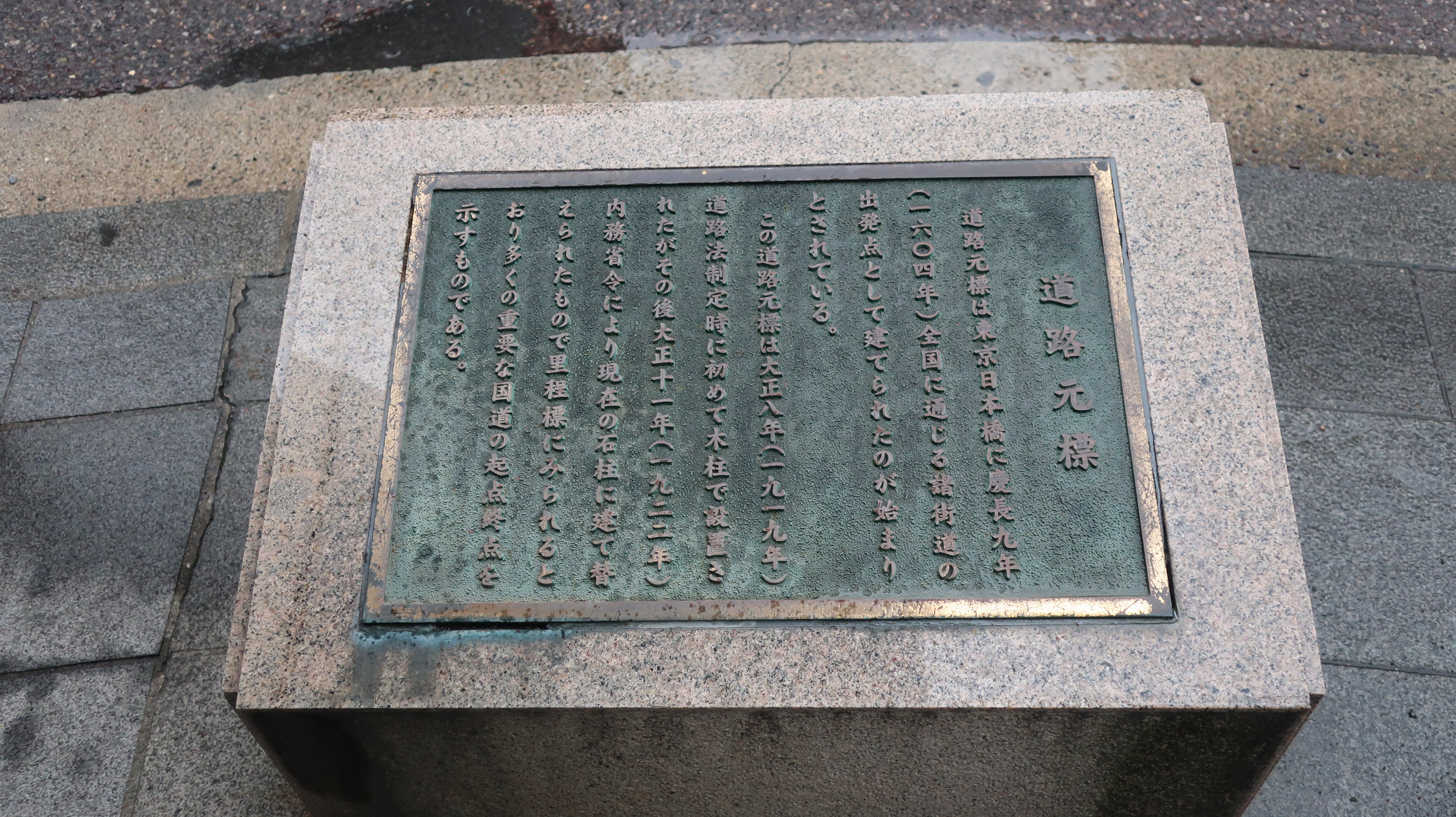 新潟市 道路元標（新潟県新潟市中央区）